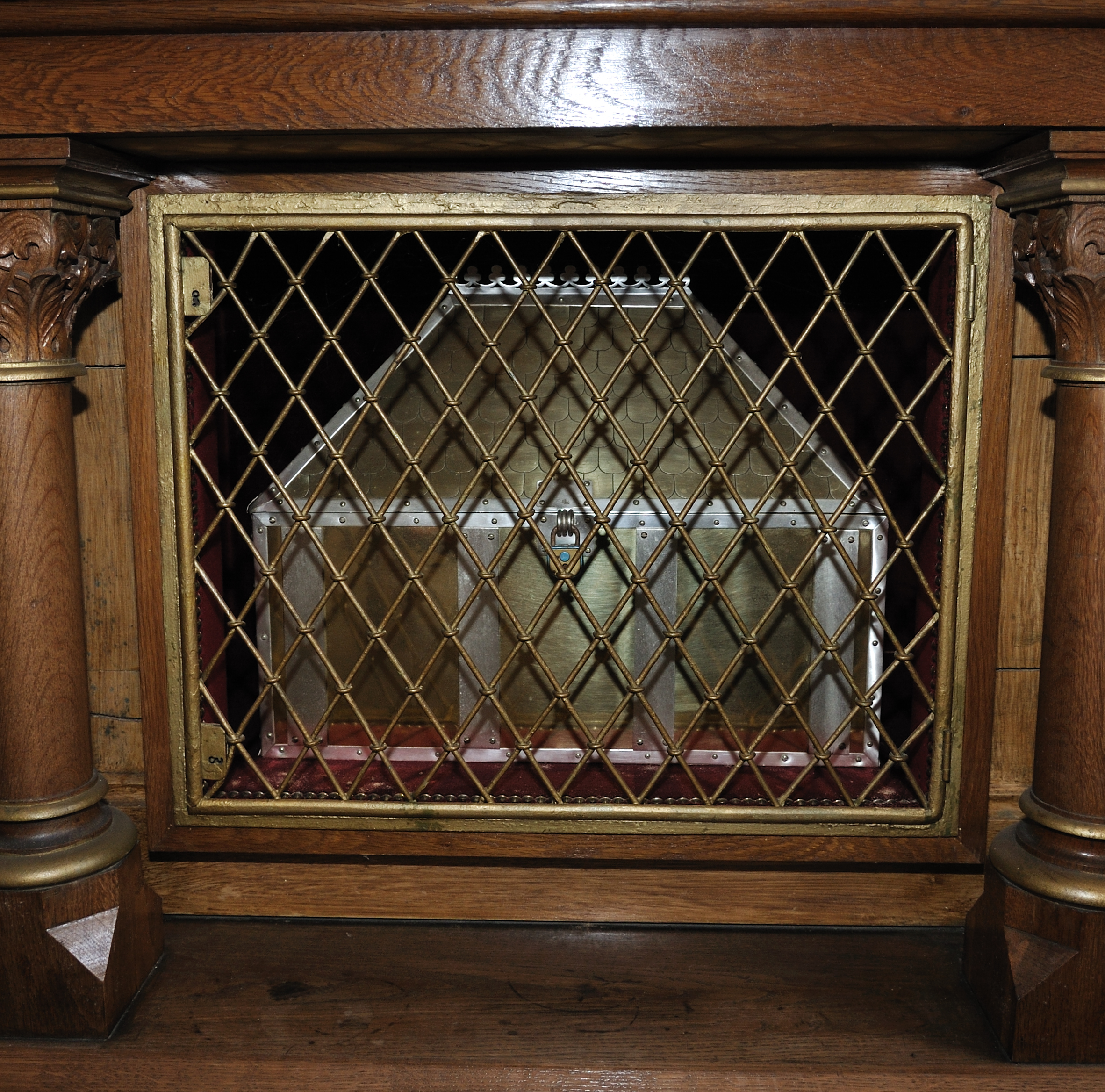 Behälter mit den Reliquien des heiligen Arnold von Hiltensweiler, in der alten Seitenkapelle der Pfarrkirche St. Dionysius, Tettnang-Hiltensweiler, Bodenseekreis